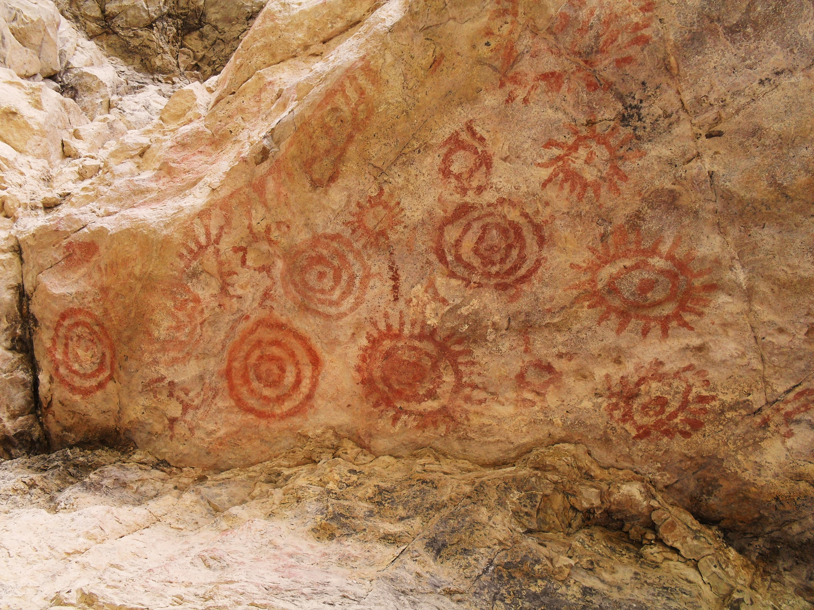 Pinturas rupestres en la localidad de Sáchica en el departamento de Boyacá en Colombia. Predominio de pictogramas de color rojo.